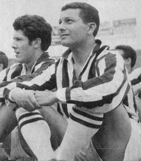 Il calciatore italiano Giorgio Stivanello alla Juventus nella stagione 1957-58, accanto al compagno di squadra italo-argentino Enrique Omar Sívori.